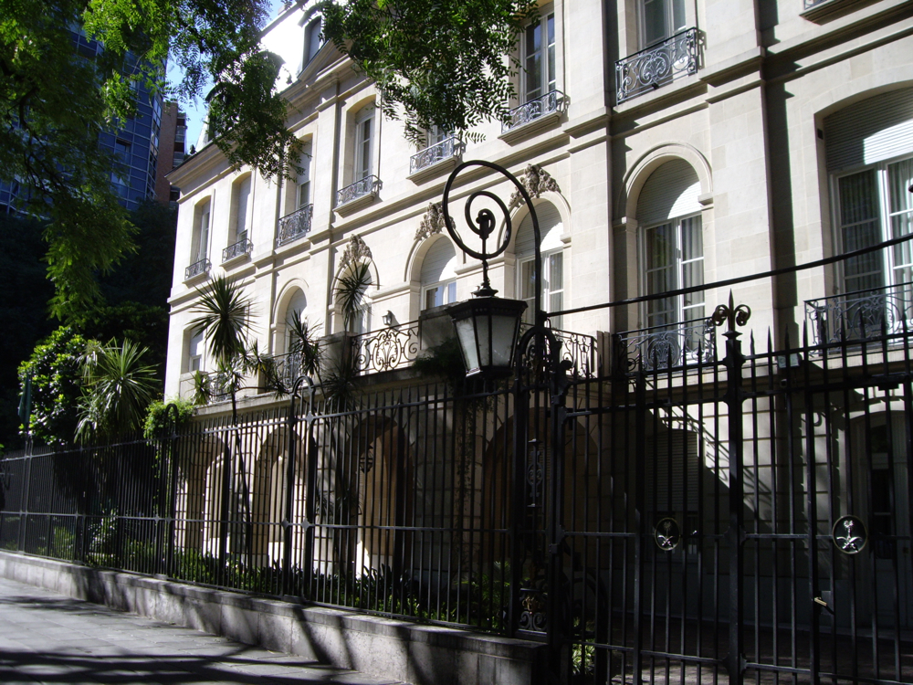 Saudi Arabian embassy in Buenos Aires